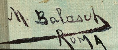 Signatura Mateu Balasch i Mateu